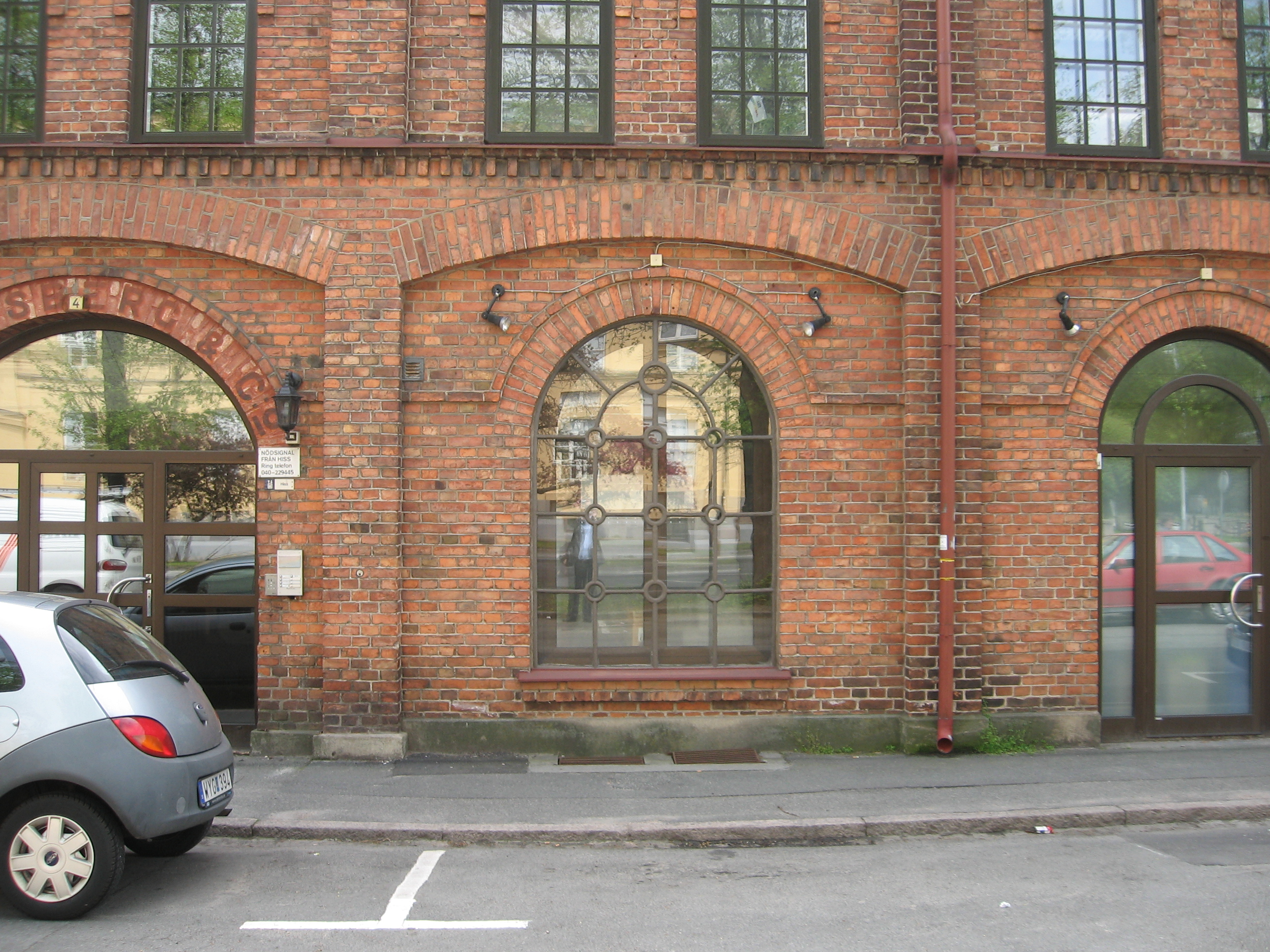 Ljunggrens verkstad, Kristianstad.